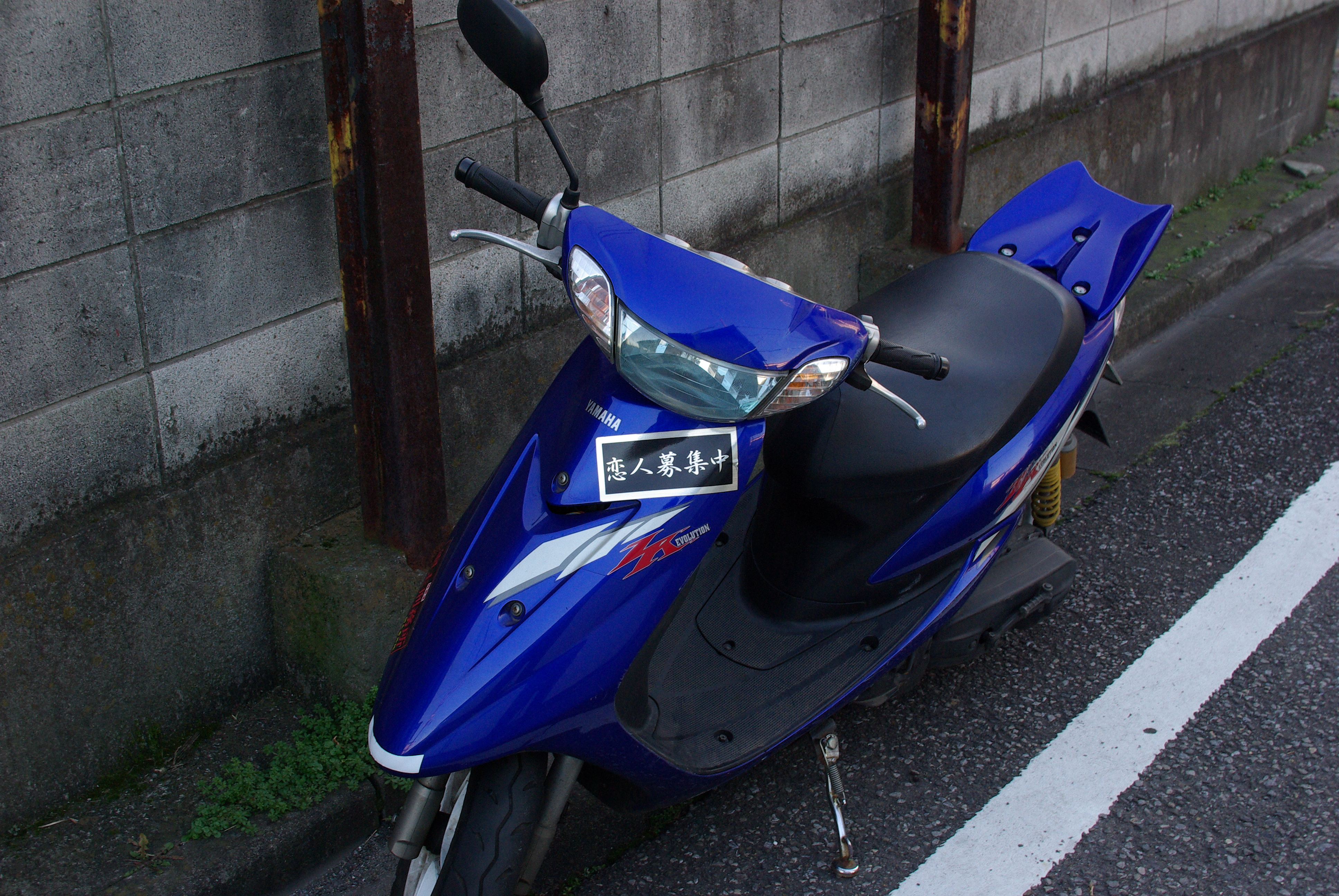 Yamaha JOG CV50ZR ZRエボリューション